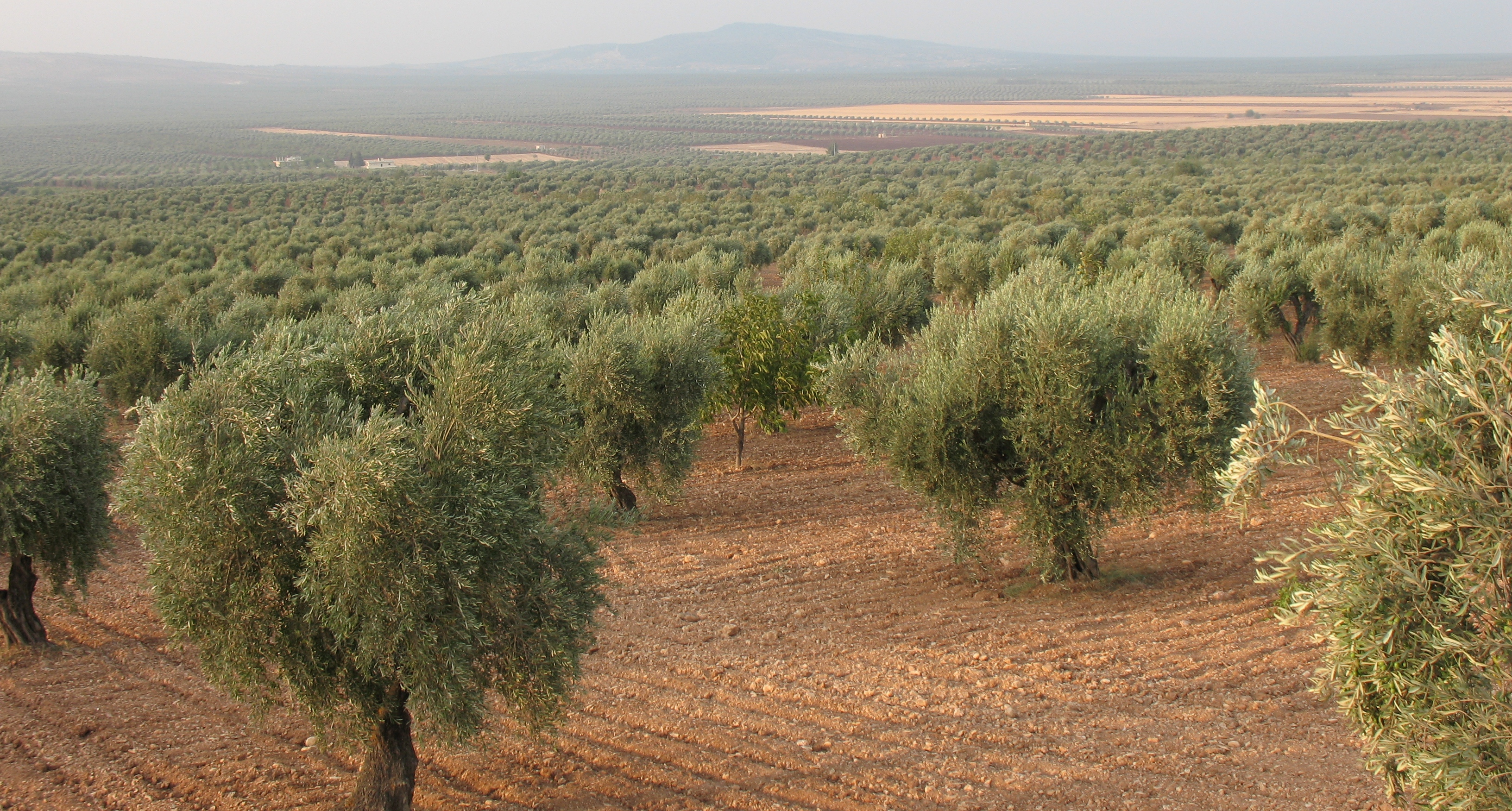 Olivenplantagen in Spanien.